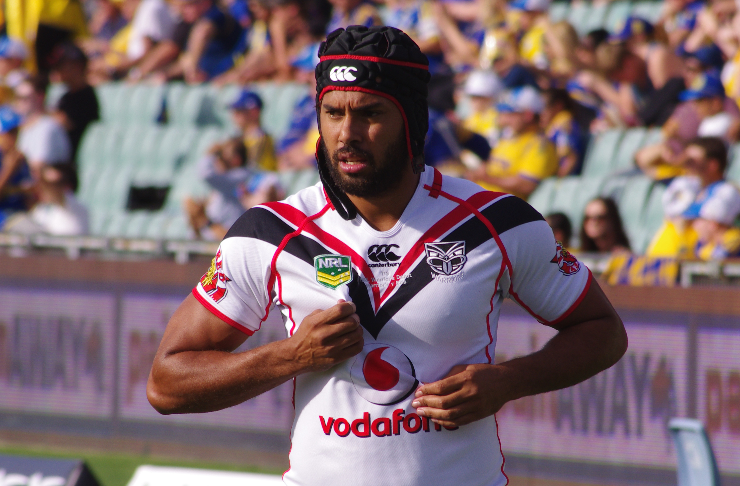 DANE NIELSON